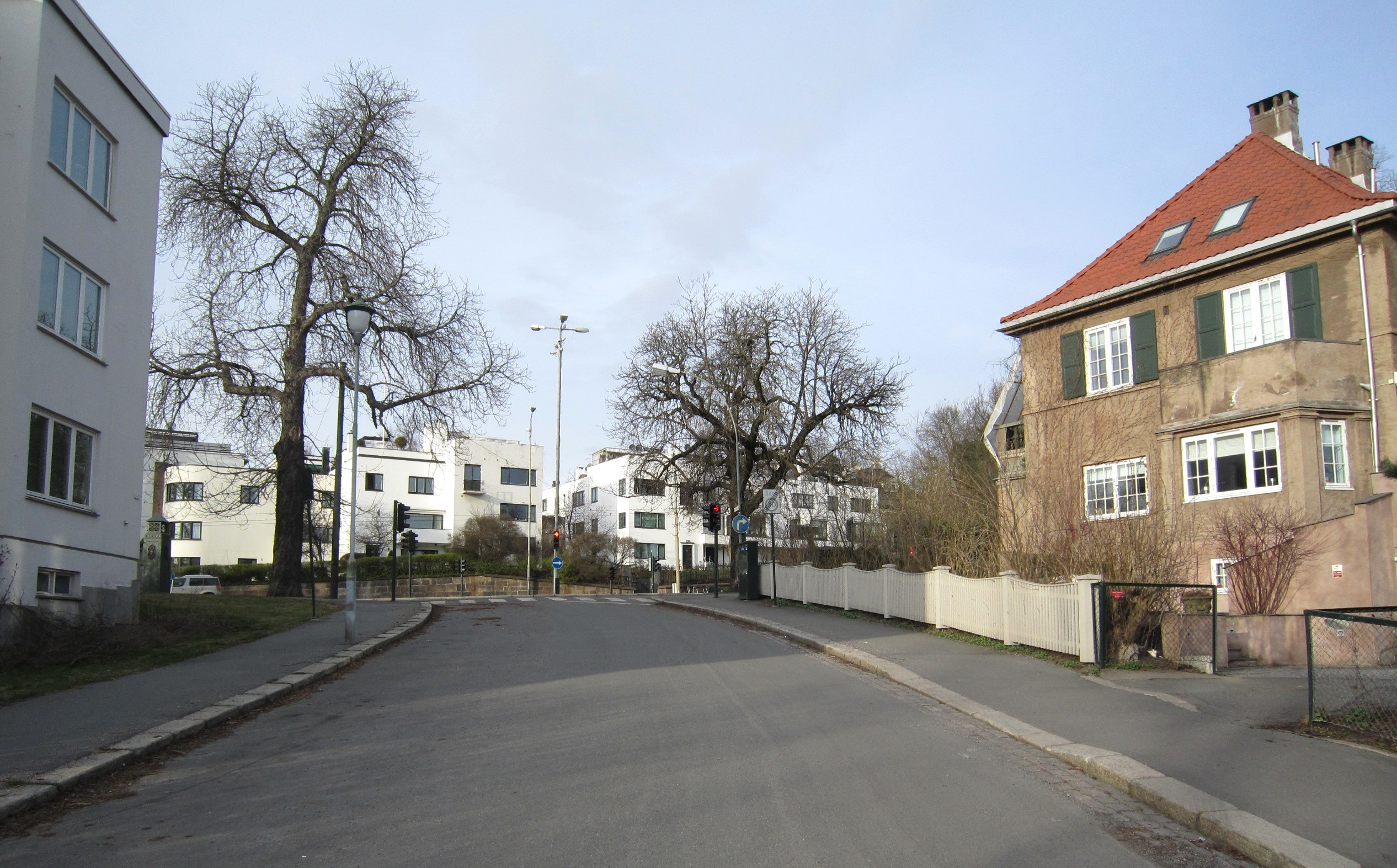 Olav Kyrres gate i Oslo